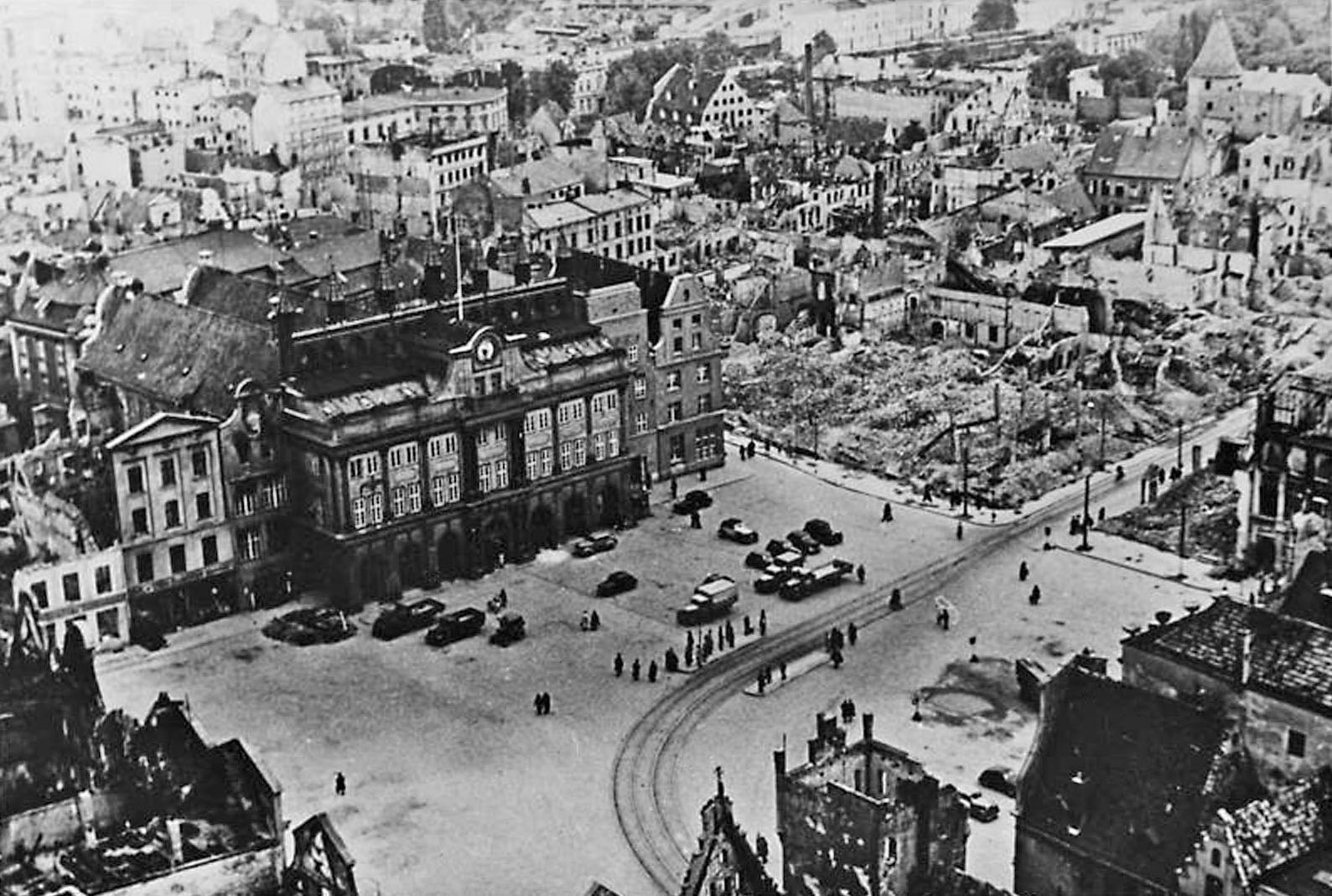 Rostock, Marktplatz mit Rathaus Zentralbild/IML Rostock 1945 Marktplatz mit Rathaus. [Rostock,- Zerstörte Innenstadt]